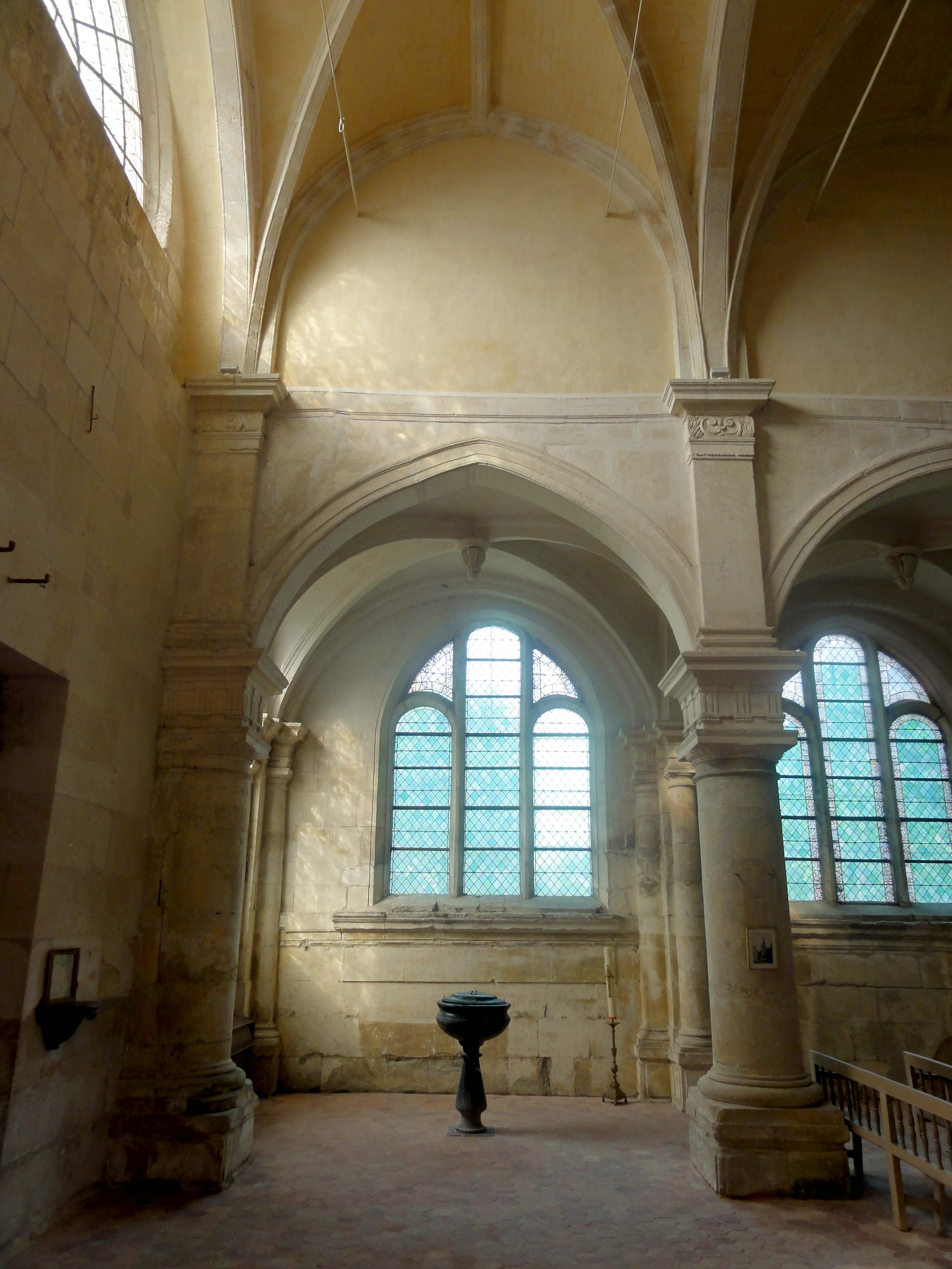 Nef, 1ère travée, élévation nord.